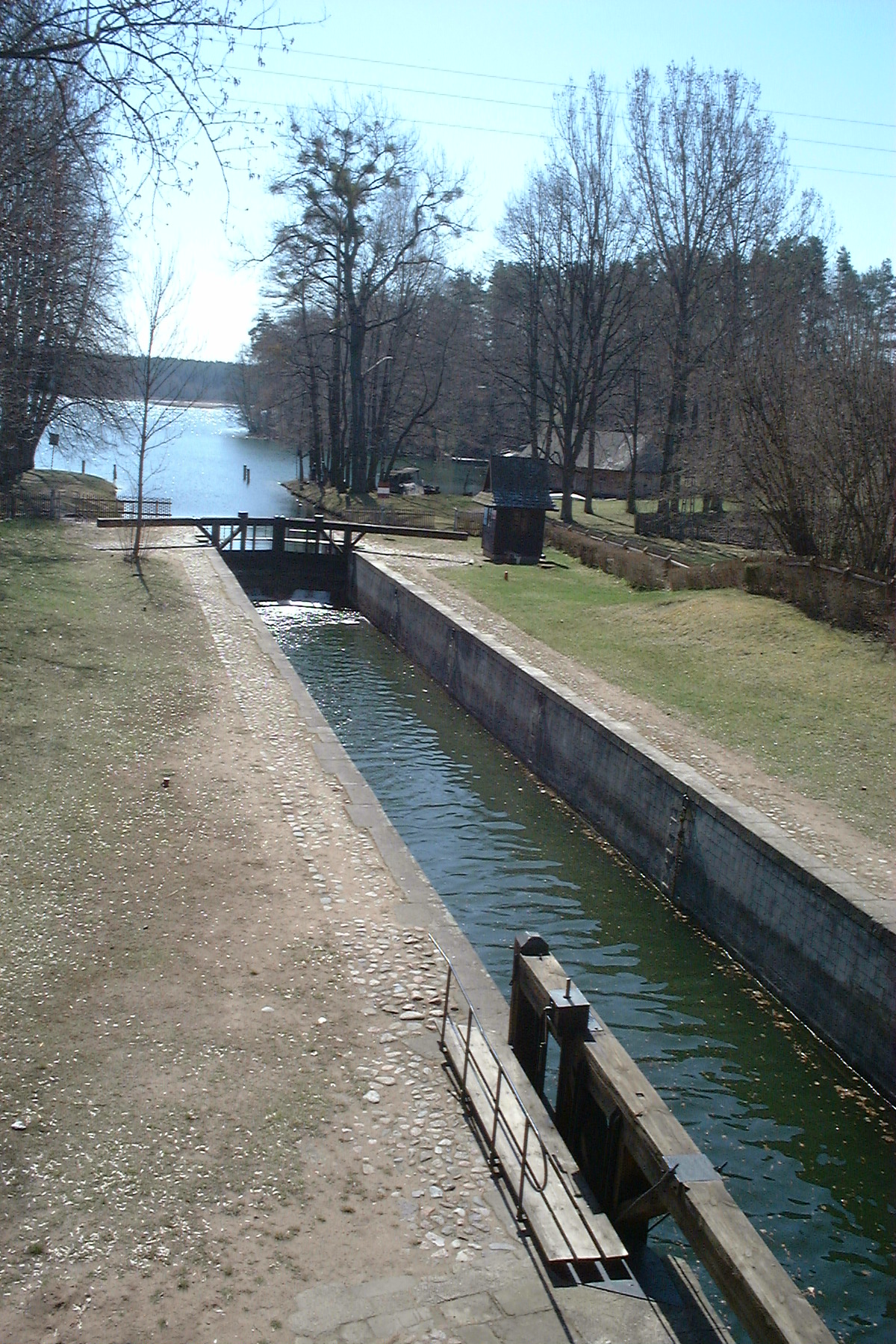 Poland, Przewiez lock, part of Augustowski Canal.